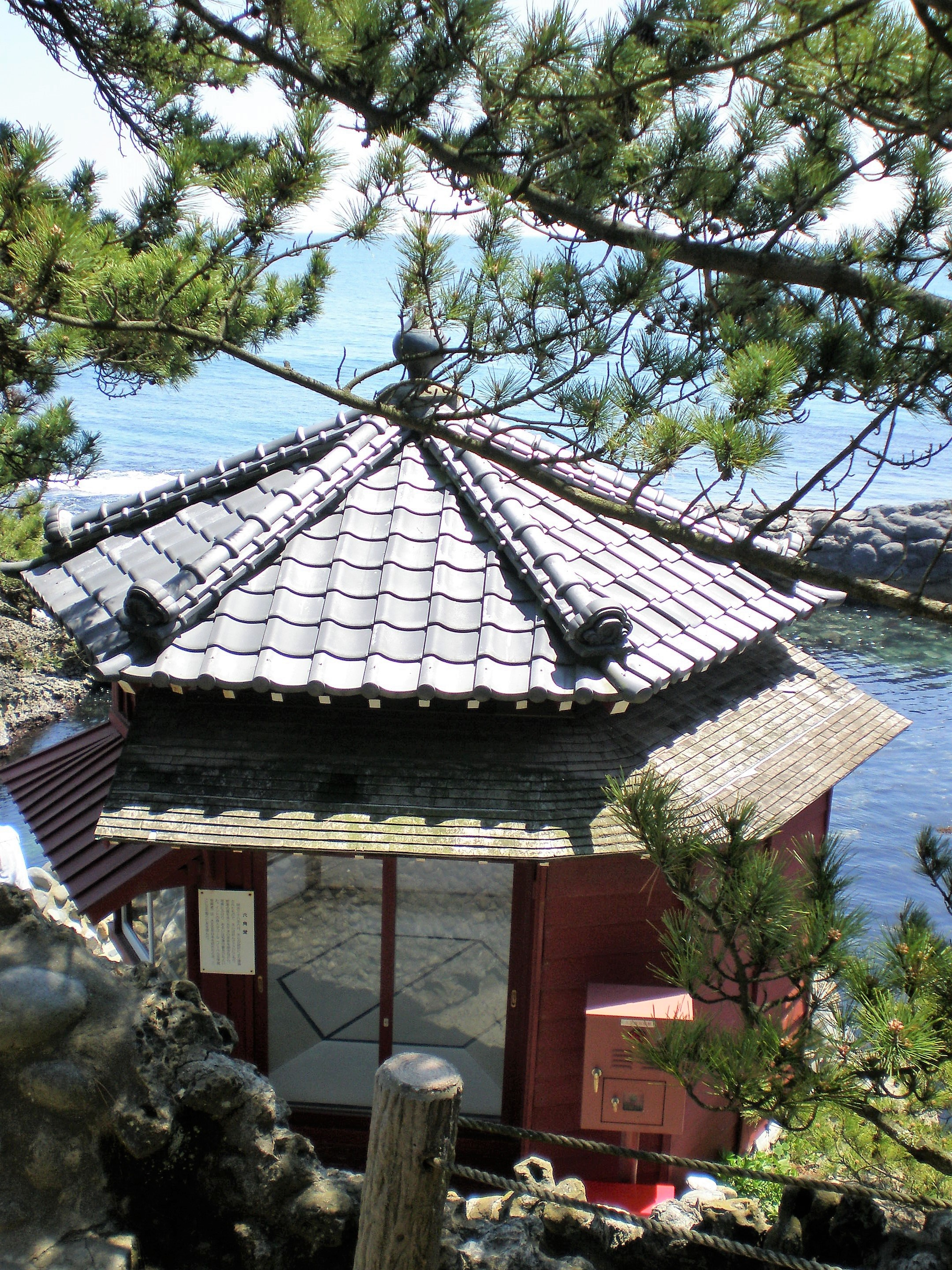 震災前の六角堂（北茨城市）